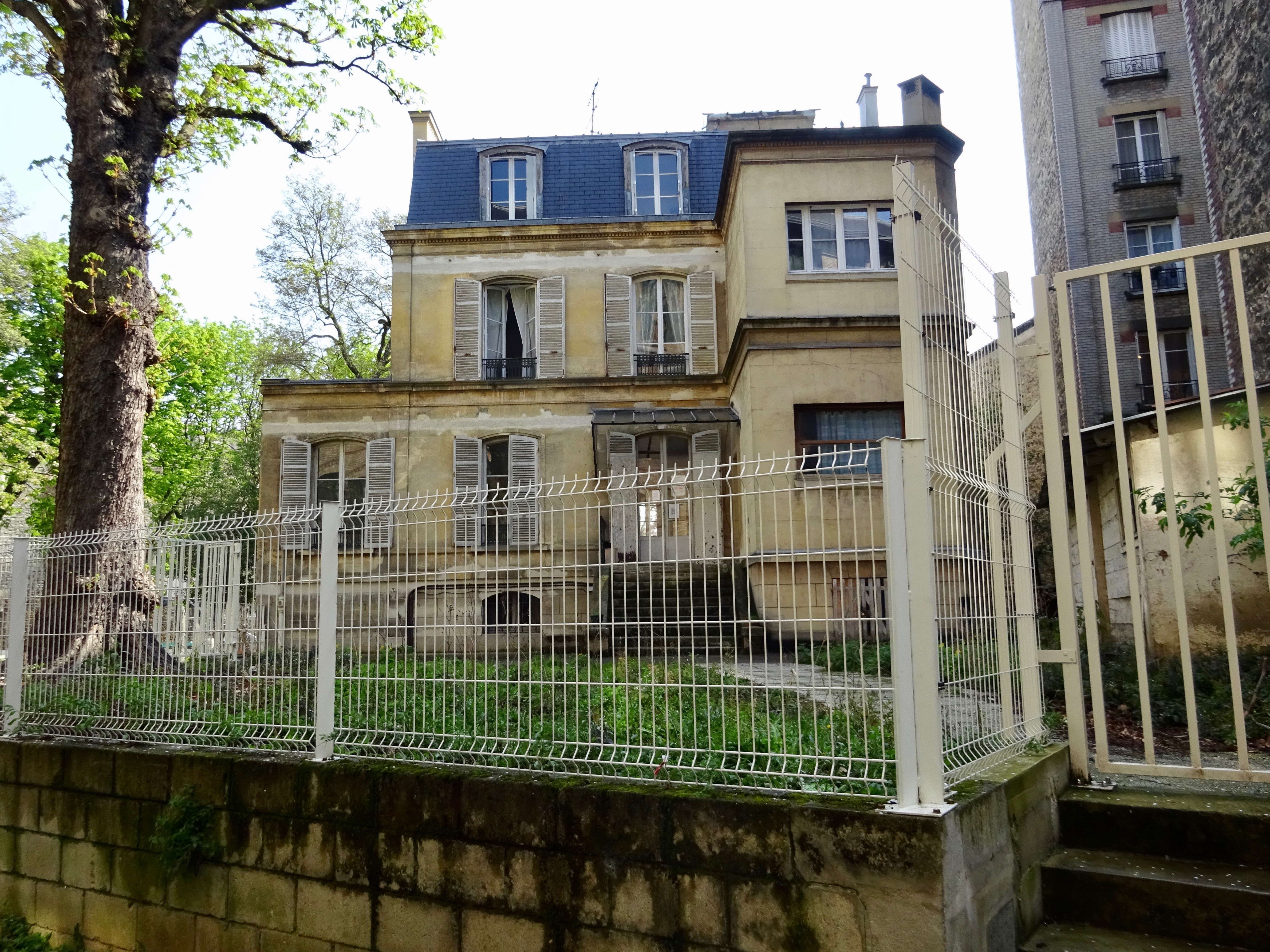 Hameau, lycée Molière (Paris, 16e).